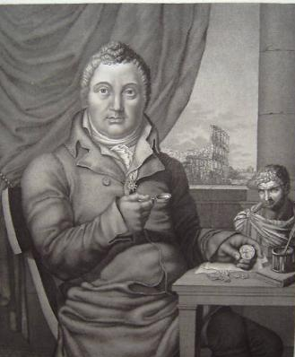 Identificazione: Ritratto di Ennio Quirino Visconti Autore: Rados Luigi (1773/ 1844), incisore; Capitani Tirsi (notizie sec. XIX prima metà), disegnatore Cronologia: ca. 1828 Oggetto: stampa Soggetto: ritratto Materia e tecnica: acquaforte; maniera a granito Misure: 371 mm. x 493 mm. (battuta della lastra) Misure: 292 mm. x 343 mm. (Parte incisa) Notizie storico-critiche: La datazione proposta si basa sull'analogia stilistica e d'impostazione che esiste fra la stampa qui catalogata e la stampa I01674 che è datata in lastra 1828. Stampa ritrovata l'8 gennaio 2001 nei cassetti segreti delle bacheche dei minerali di proprietà della Fondazione.